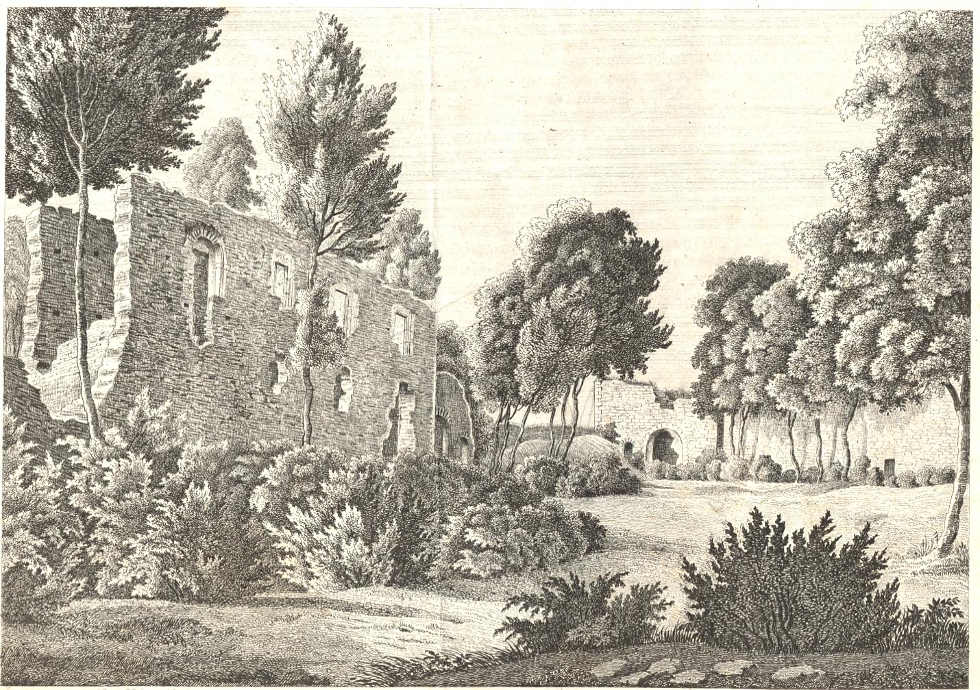 Nádvoří hradu Pravda v roce 1847